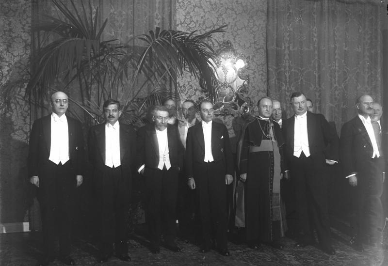 Der französische Ministerbesuch in Berlin ! Grosser Empfangsabend für die französischen Minister in der Reichskanzlei in Berlin, von links nach rechts: Reichskanzler Dr. Brüning, der französische Ministerpräsident Laval, der französische Aussenminister Briand, Reichsaussenminister Dr. Curtius, Weihbischof Schreiber, Reichsverkehrsminister von Guérard, Reichsinnenminster Dr. Wirth nach dem Dinner, das der Reichskanzler den Gästen gab.